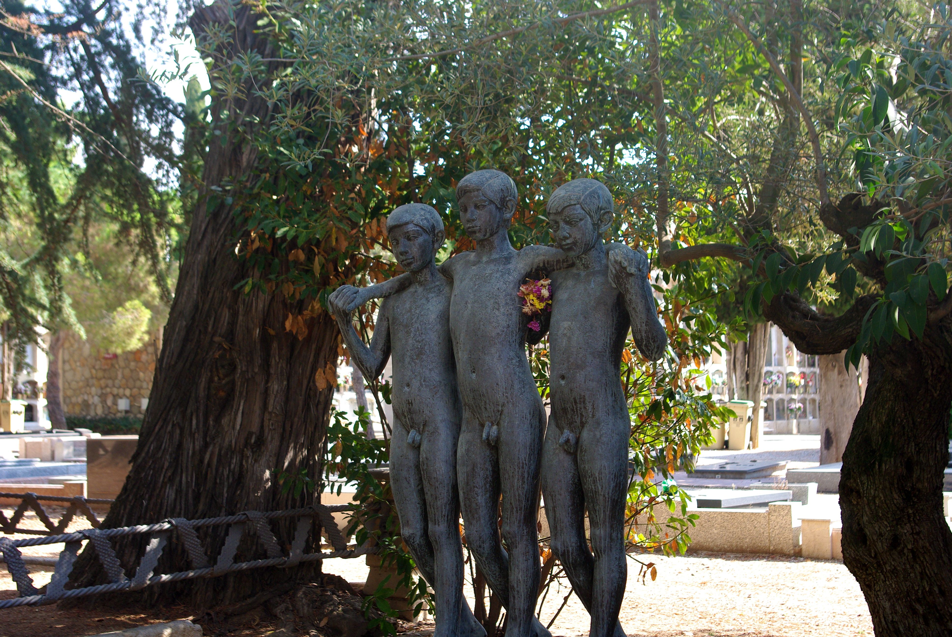 Escultura de Joan Rebull a la seva tomba al cementiri de Reus